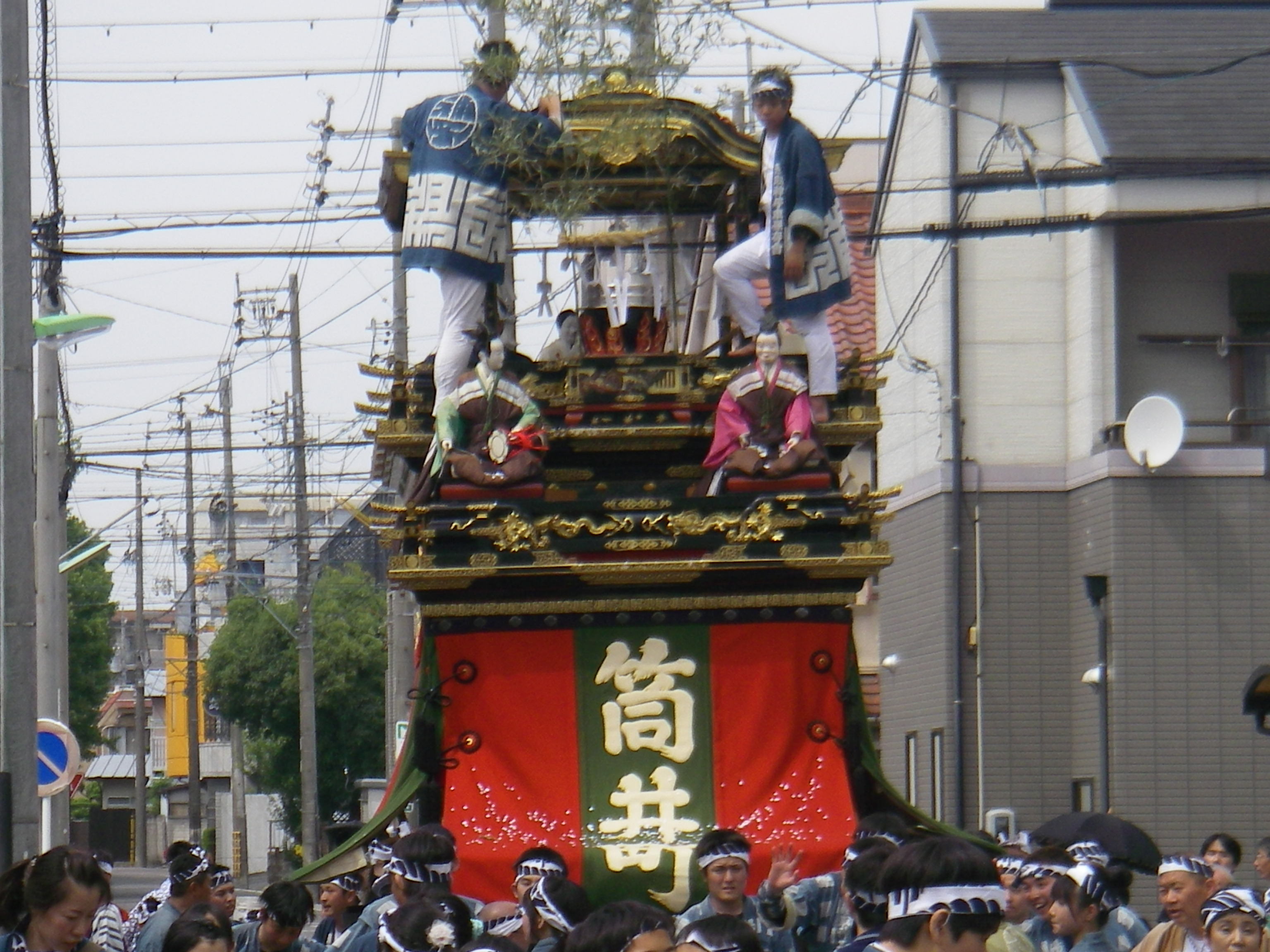 湯取車（名古屋市東区筒井）筒井地区にて